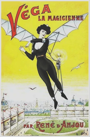 Couverture dessinée par Albert en 1912.